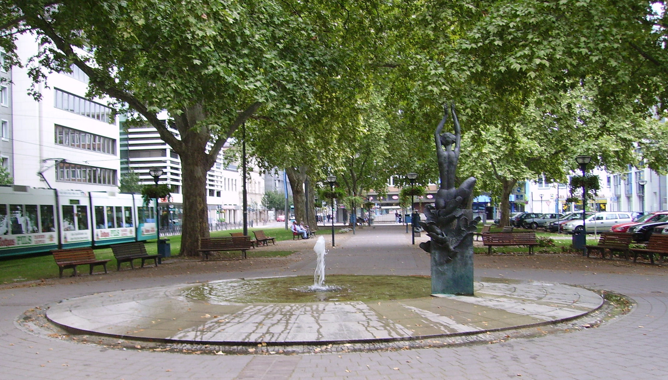 Ludwigsplatz in Ludwigshafen, Germany